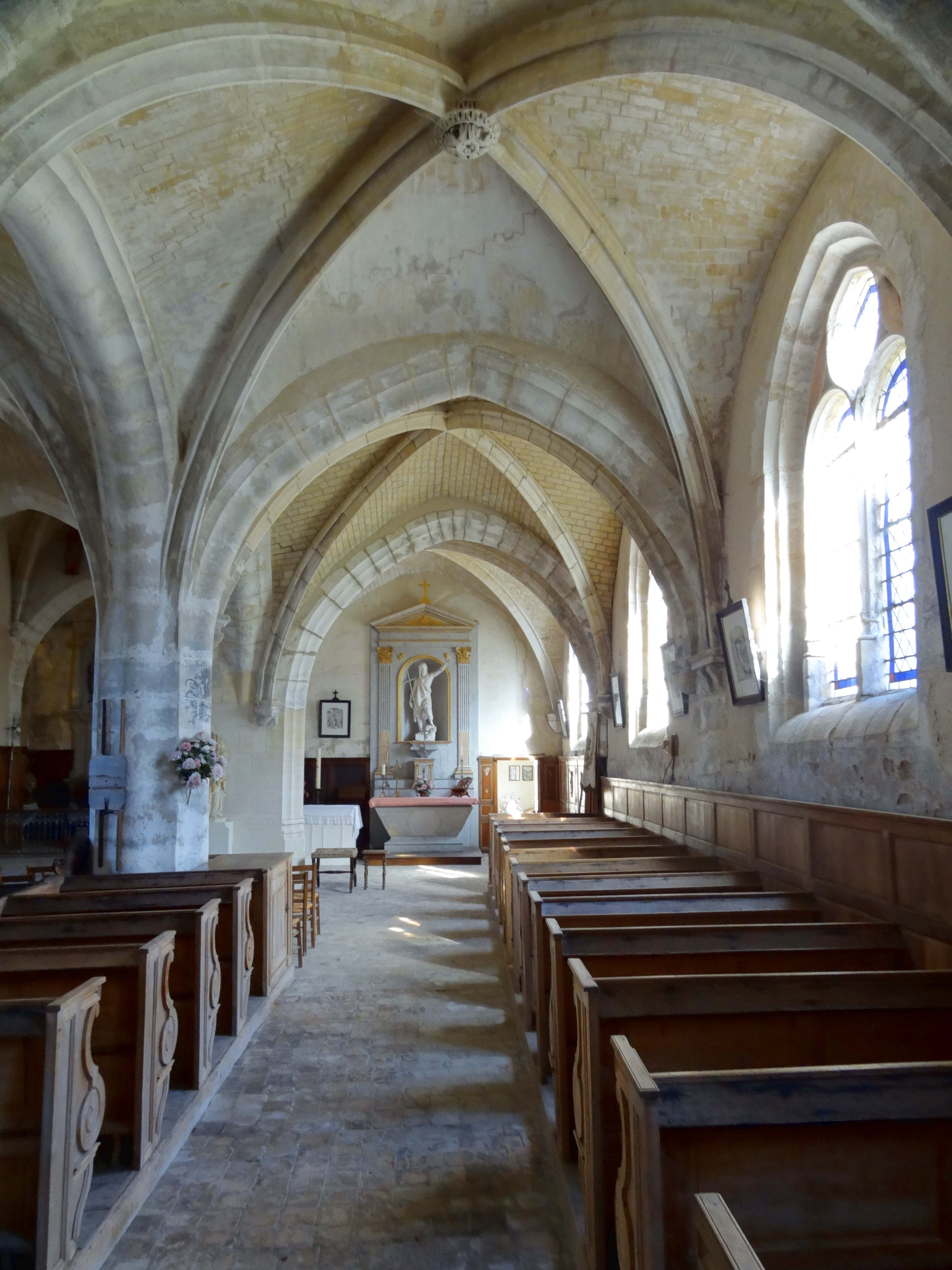 Intérieur de l'église - voir titre.